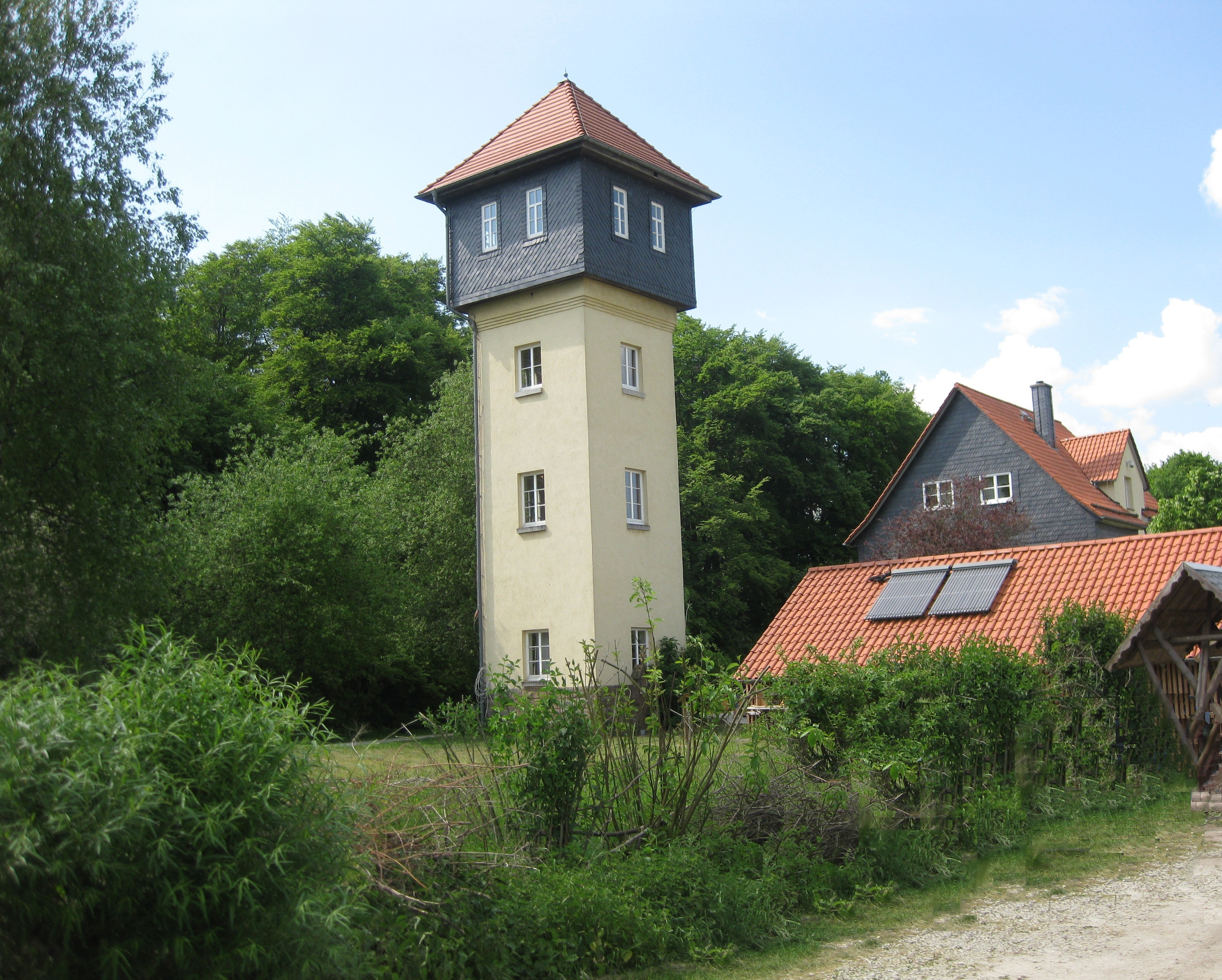 Fürstenhagen Naturparkzentrum (mit ehemaligem Wasserturm)